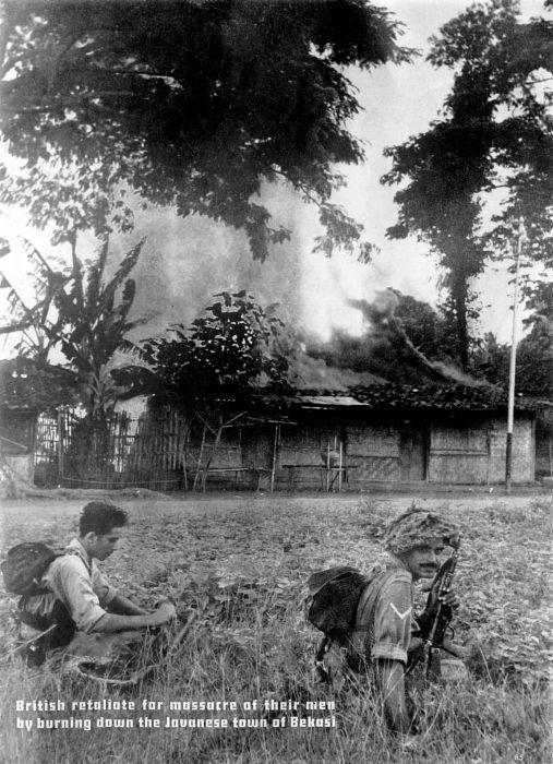 Repronegatief. Het platbranden van Bekasi als represaille voor de moord op Britse soldaten